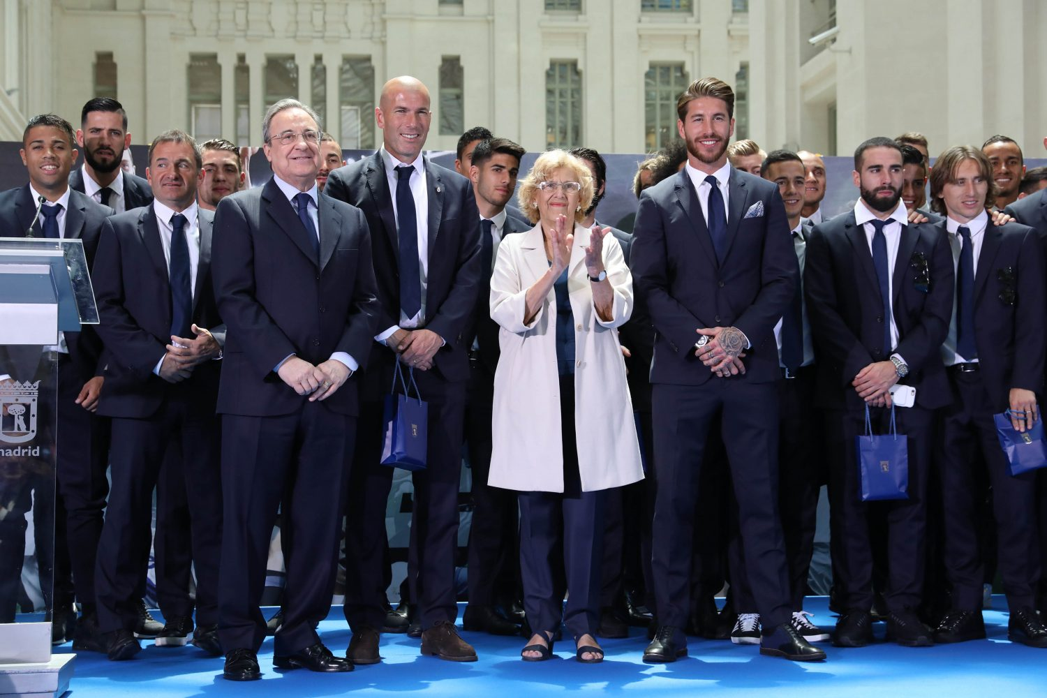 Un palmarés inigualable, que se vio ayer enriquecido con un nuevo título, el trigésimo tercero de la Liga de Fútbol, conseguido tras cinco años de intentos frustrados. Hoy el Real Madrid ha venido al Ayuntamiento a ofrecer el título al pueblo de Madrid y jugadores, técnicos y directivos han salido del palacio de Cibeles con un nuevo trofeo, más dulce aún si cabe: una medalla de chocolate blanco y negro con el talismán del equipo, la fuente de Cibeles, grabado en una de sus caras.